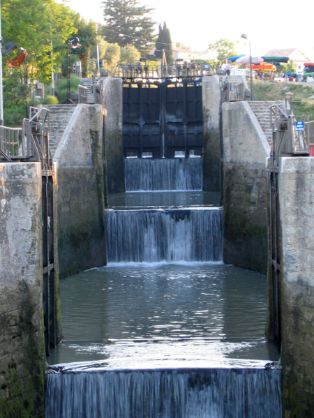 Écluses de Fonseranes à Béziers, ouvertes lors de la fête du Canal du Midi.